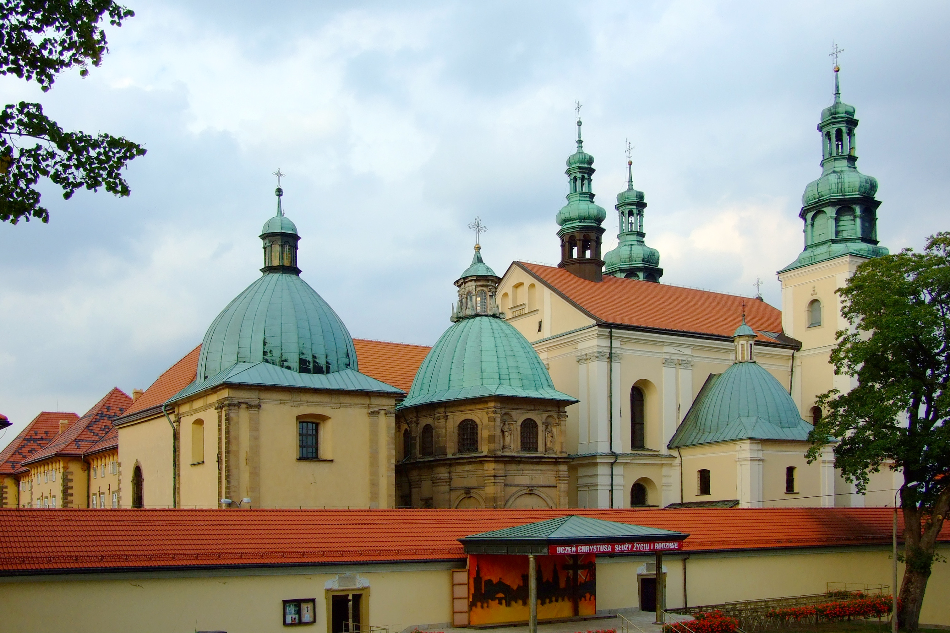 Sanktuarium pasyjno-maryjne w Kalwarii Zebrzydowskiej